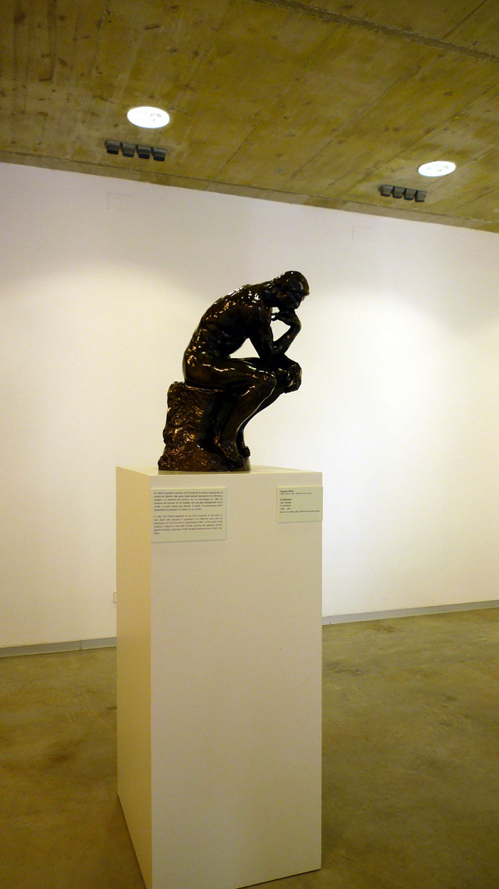 El pensador de Rodin. Exposición en el MURAM de Cartagena (España).